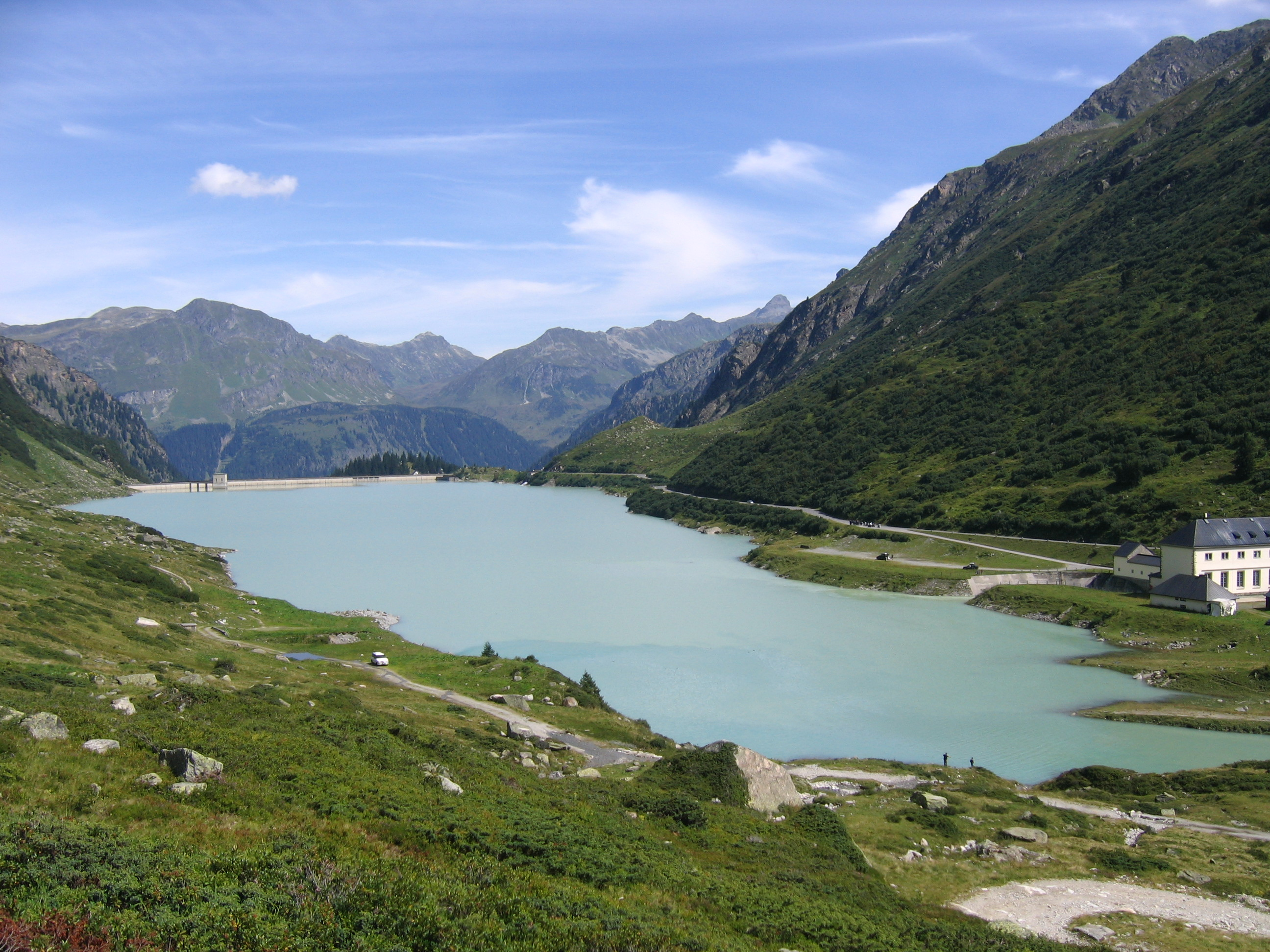 Österreich - Vorarlberg: Vermuntsee